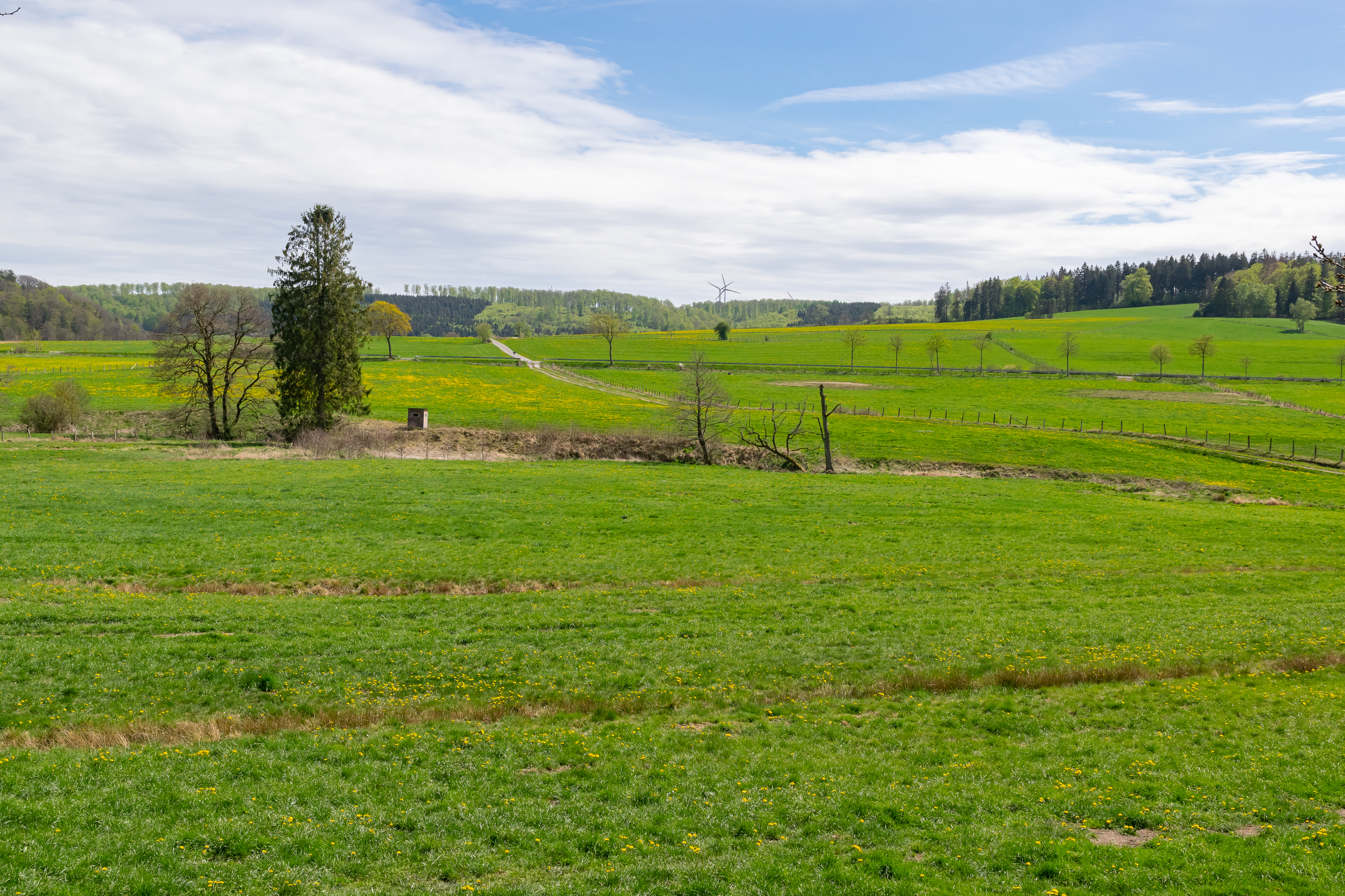 Naturschutzgebiet Lühlingsbach-Nettetal in Bad Wünnenberg, Kreis Paderborn (vorne) und Nettetal in Brilon, Hochsauerlandkreis (hinten)